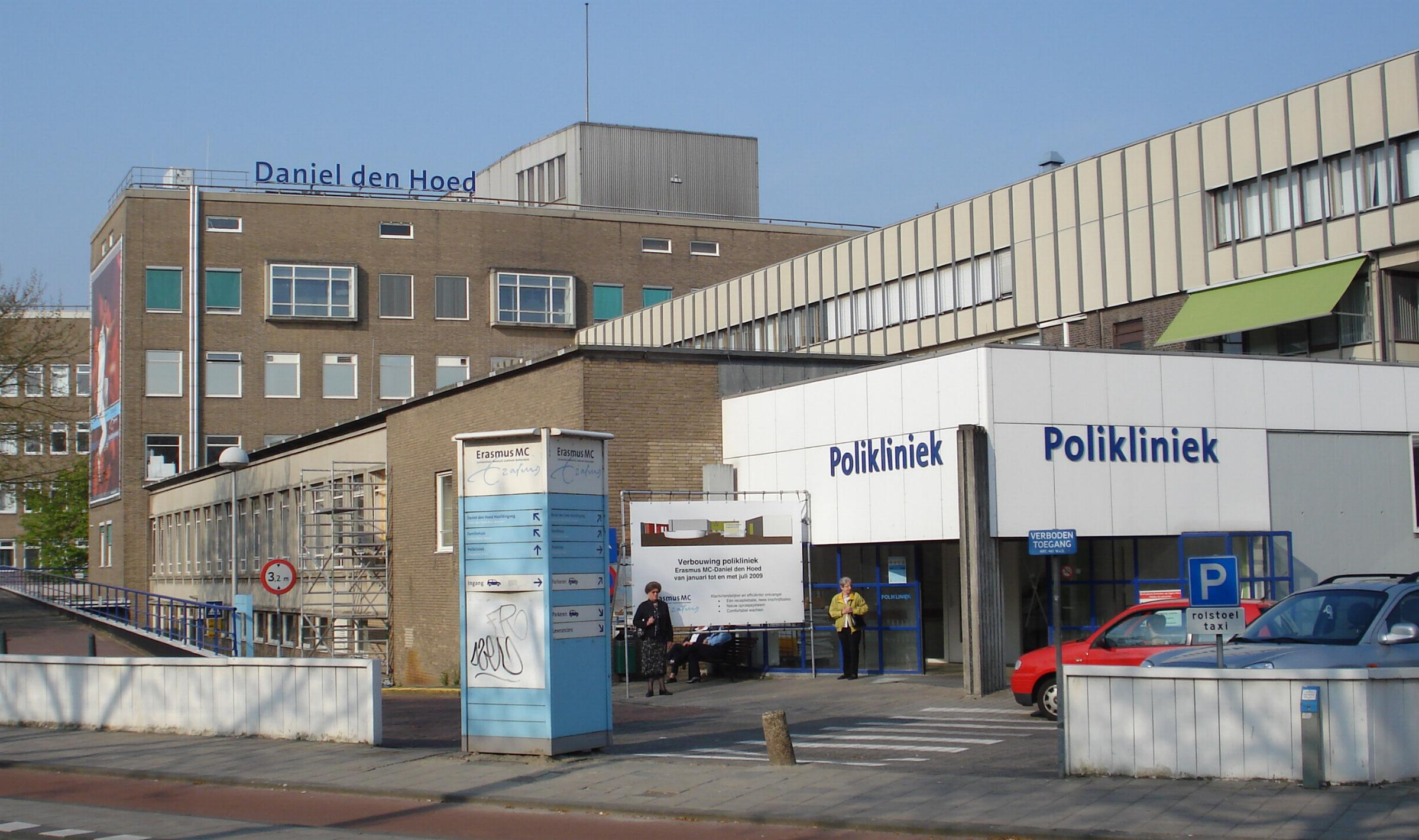 Rotterdam, Daniel den Hoed kliniek.